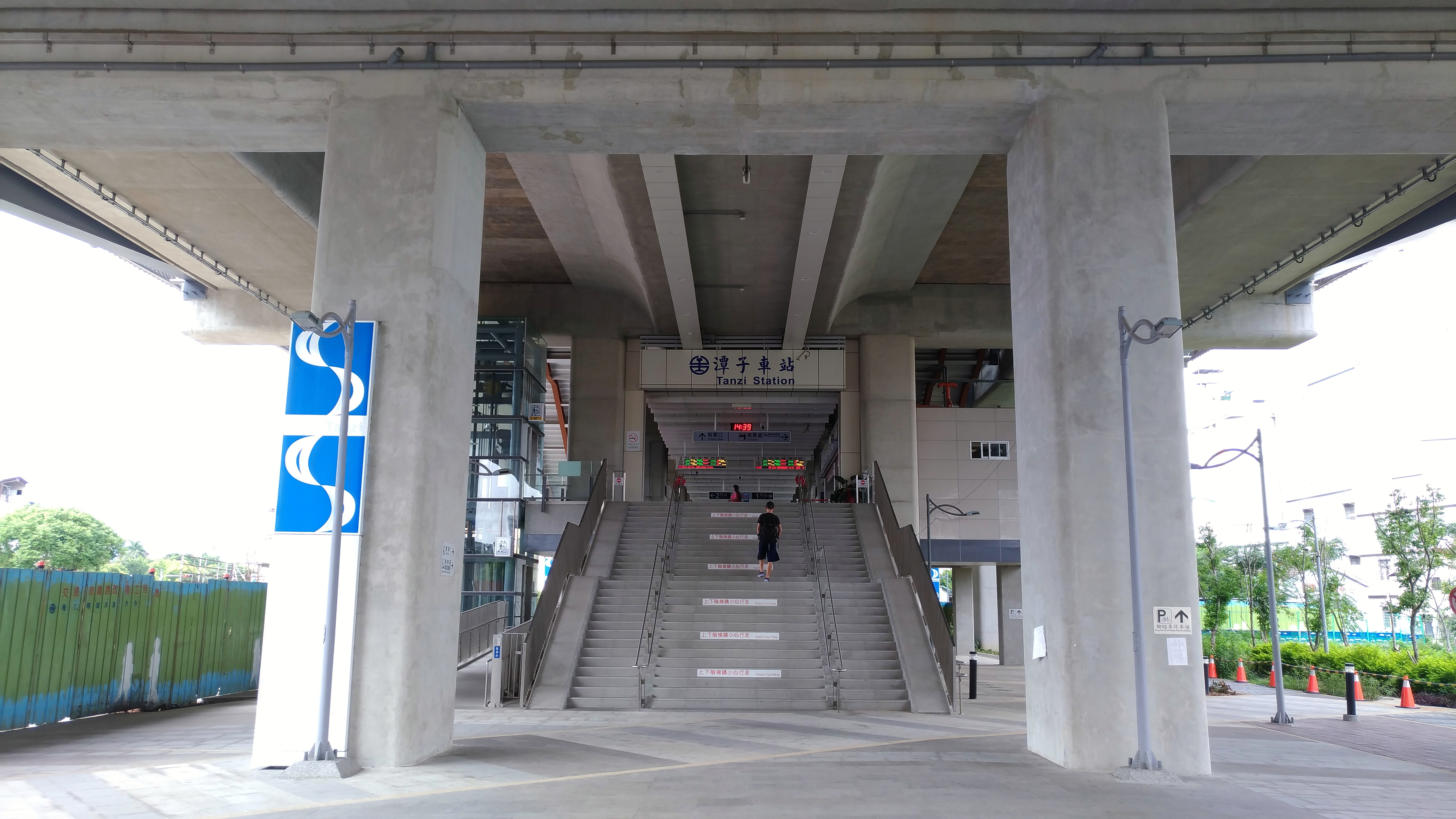 中文（台灣）: 潭子車站出入口